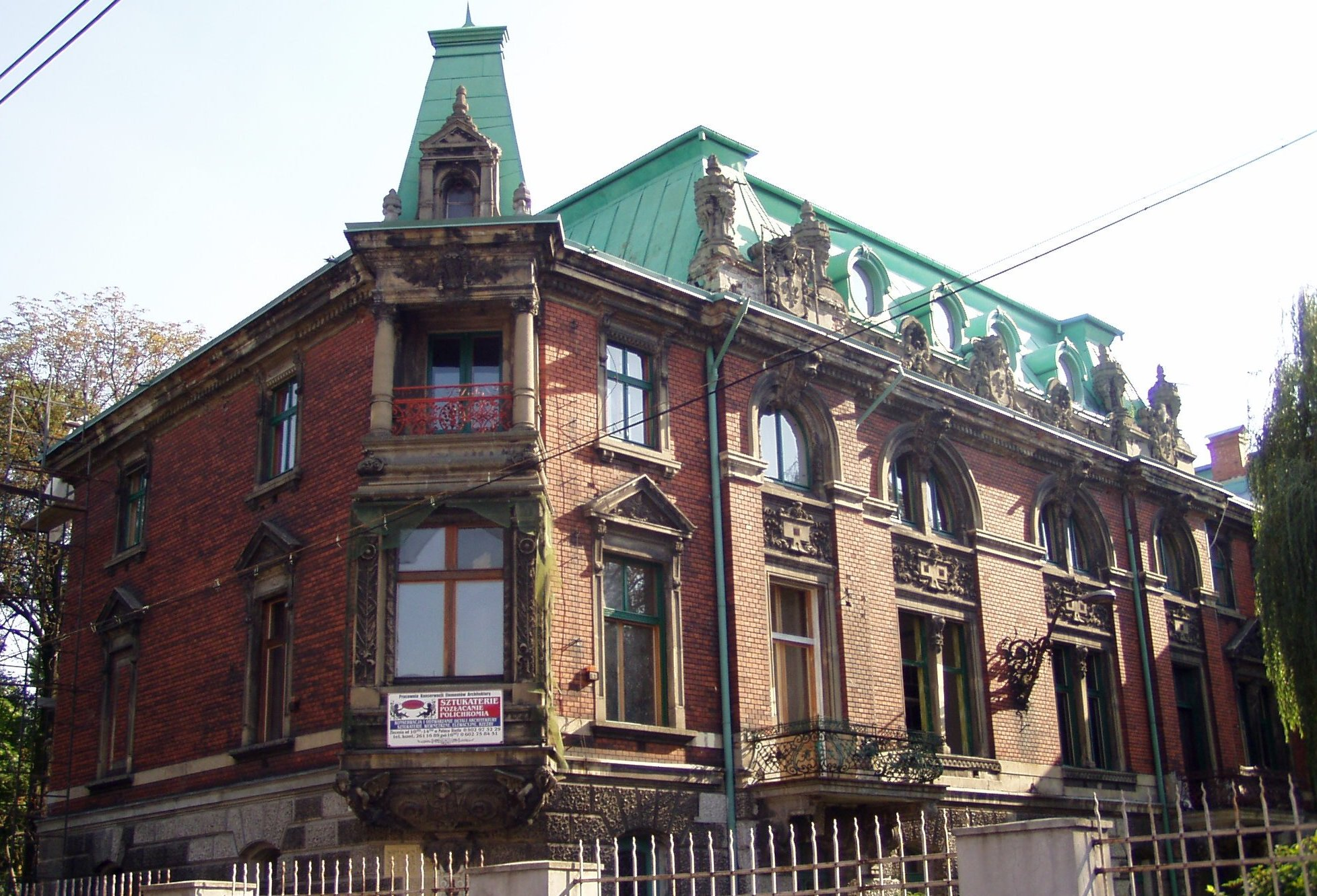 Pałac widok z ul Żeromskiego. Autor: W. Grabowski.